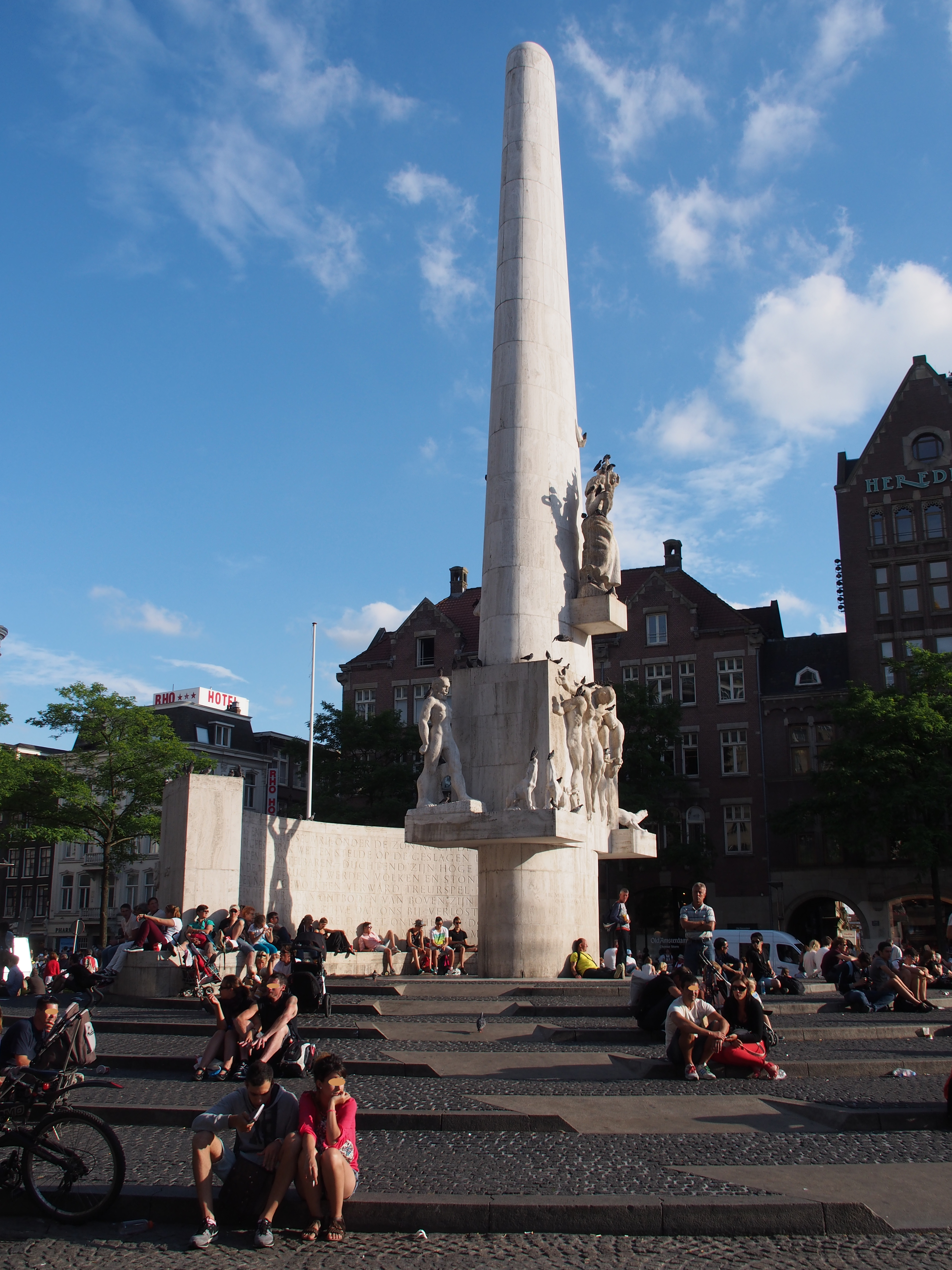 Nationaldenkmal am Platz Dam - Mahnmal für die Opfer der deutschen Besatzung im Zweiten Weltkrieg und Monument der Befreiung und des Friedens